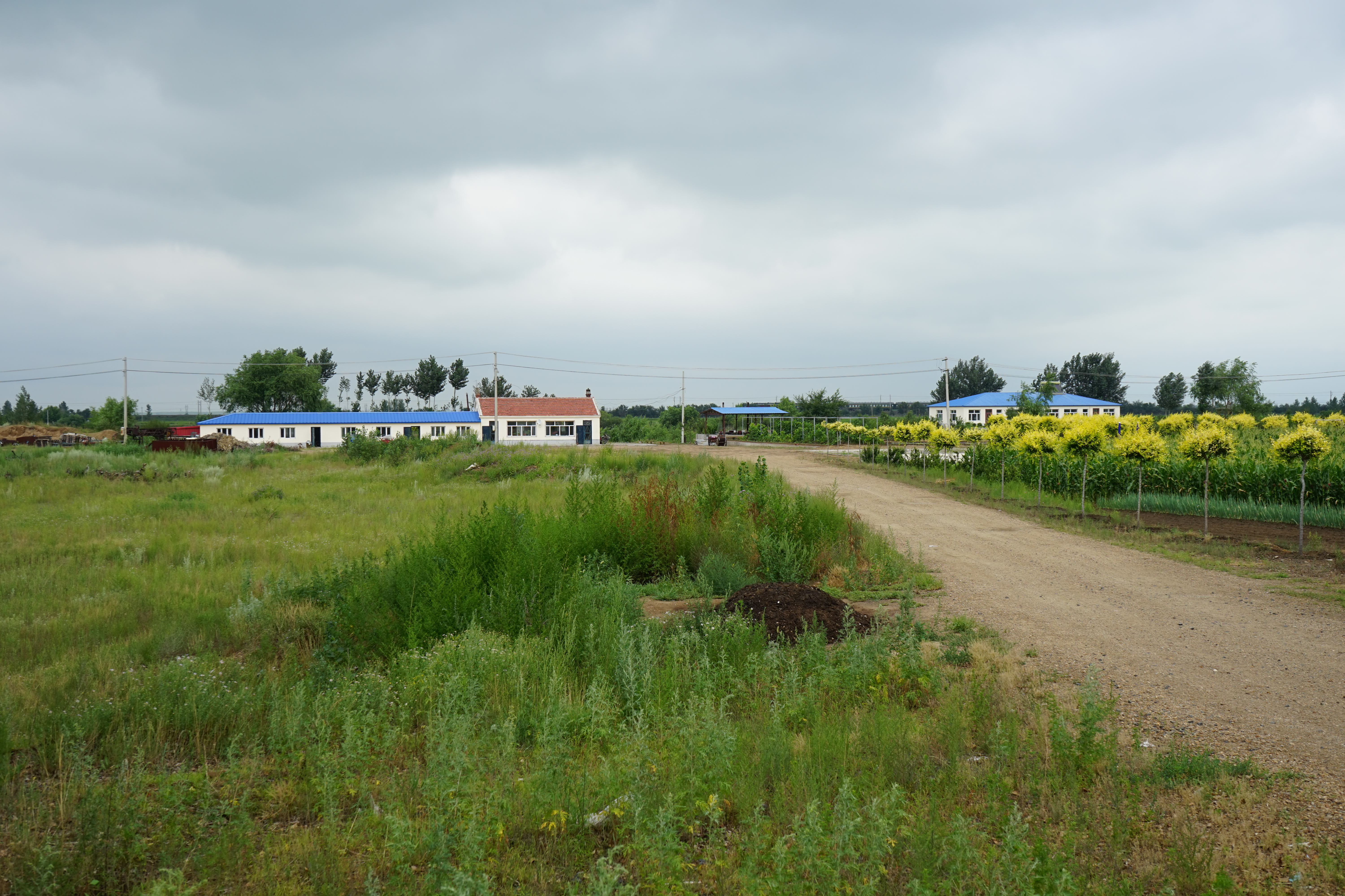 中文（中国大陆）: 乡村。昂昂溪五福